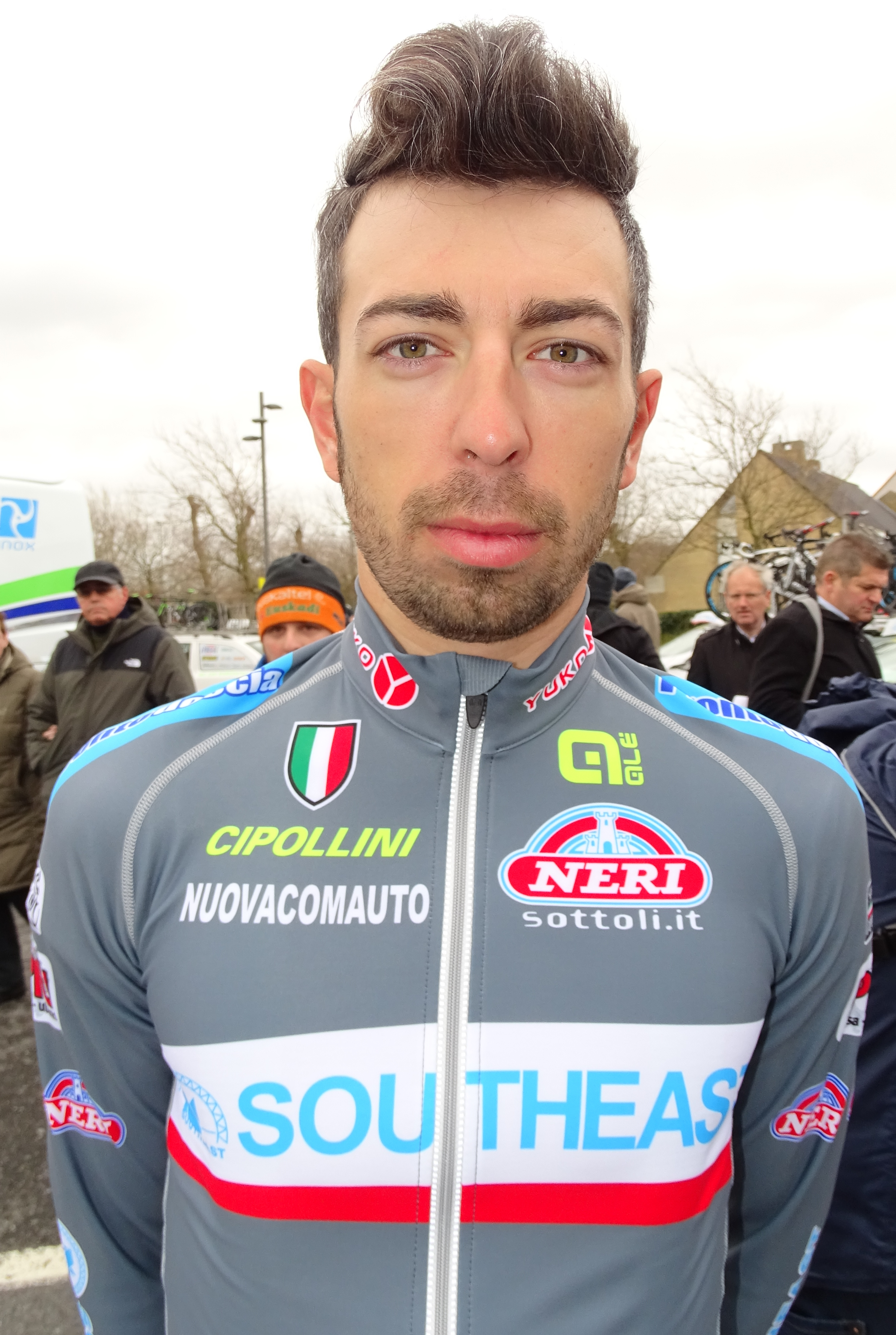 Reportage réalisé le mardi 31 mars à l'occasion de du départ de la première étape des Trois jours de La Panne 2015 à La Panne, Belgique.